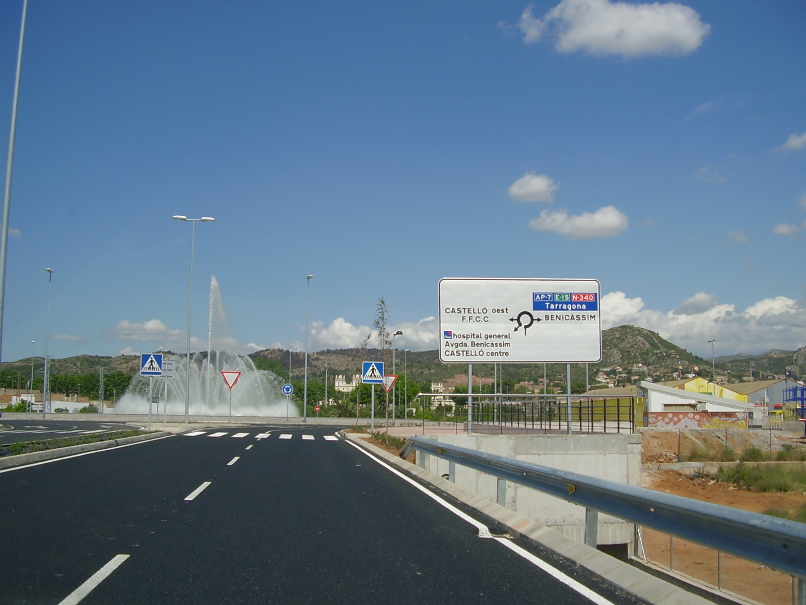 Imagen de la Ronda Norte de Castellón de la Plana (España)